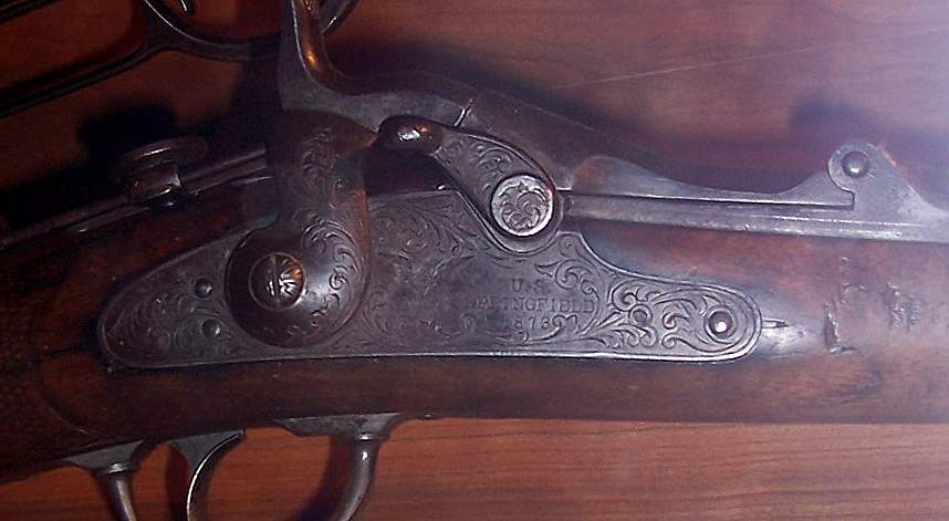 Al Siebers Rifle Detailaufnahme